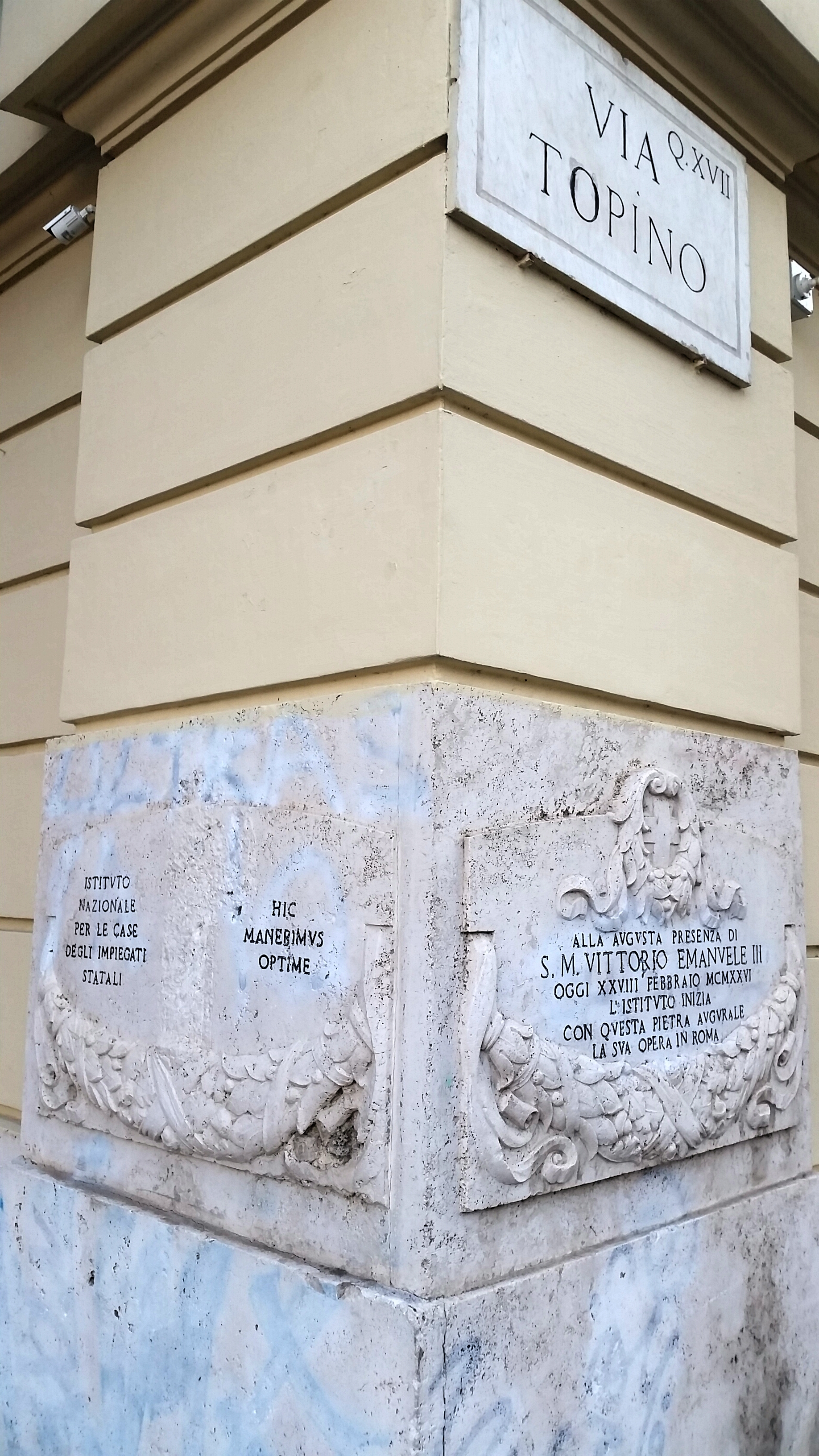 Prima pietra delle costruzioni INCIS posata il 28 febbraio 1926 a Roma